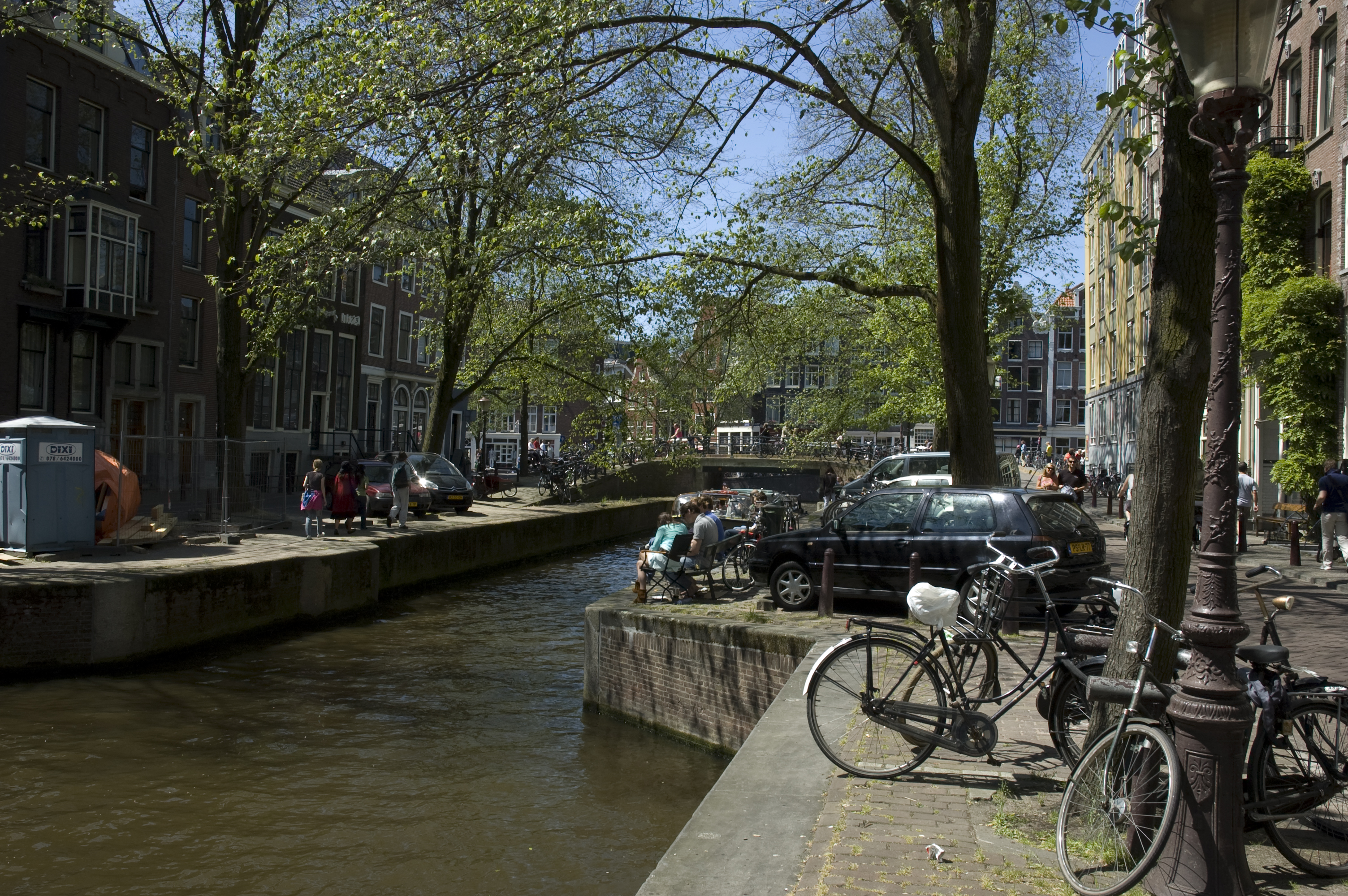 Leliegracht